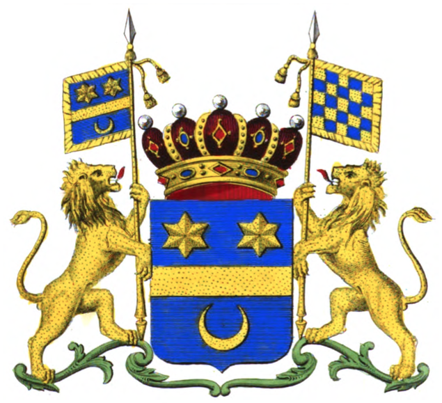 Armoiries de la famille Bonaert